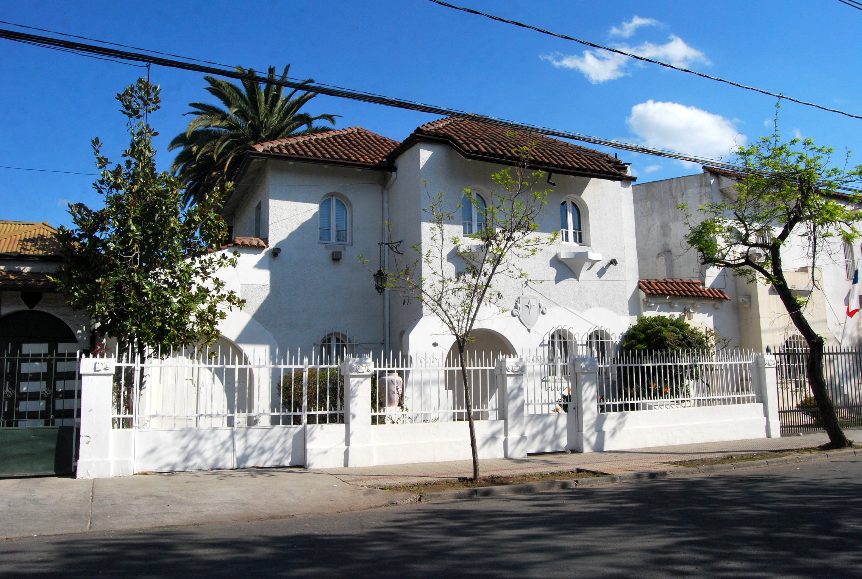 Casa de Av. Francia Nº 1442 This is a photo of a national monument in Chile: 738